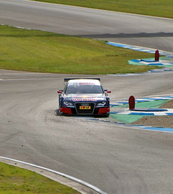 Ekström, DTM driver, in Oschersleben 2011, beside a Ludwig-Teller, a round type of curbs